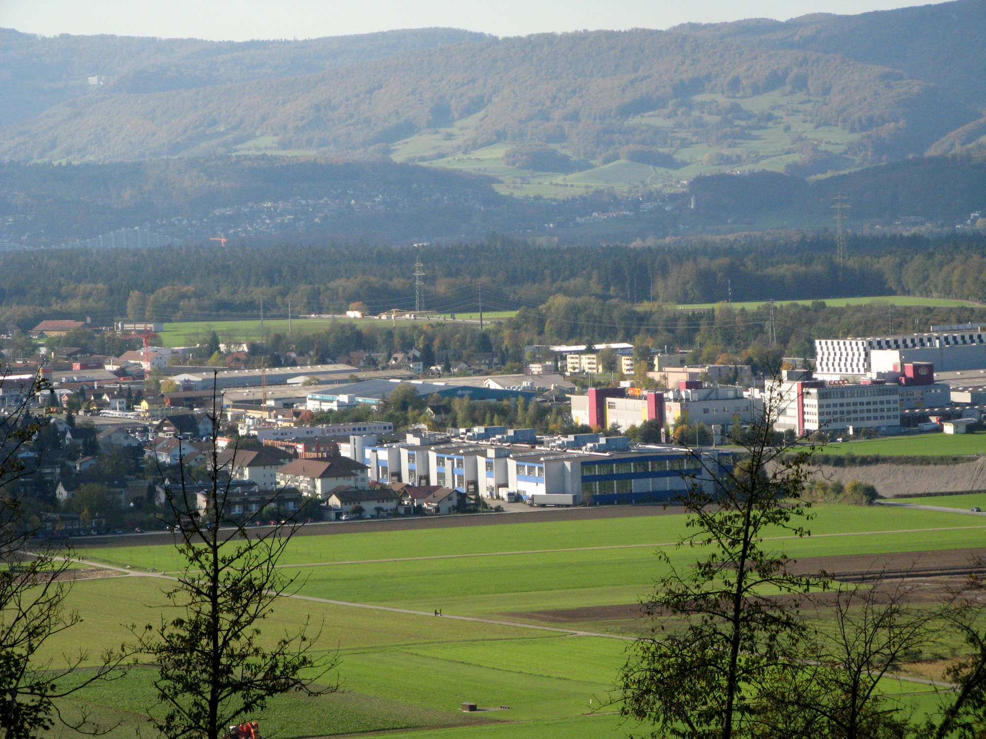 TeilAnsicht von Hunzenschwil, auf dem Staufberg aufgenommen